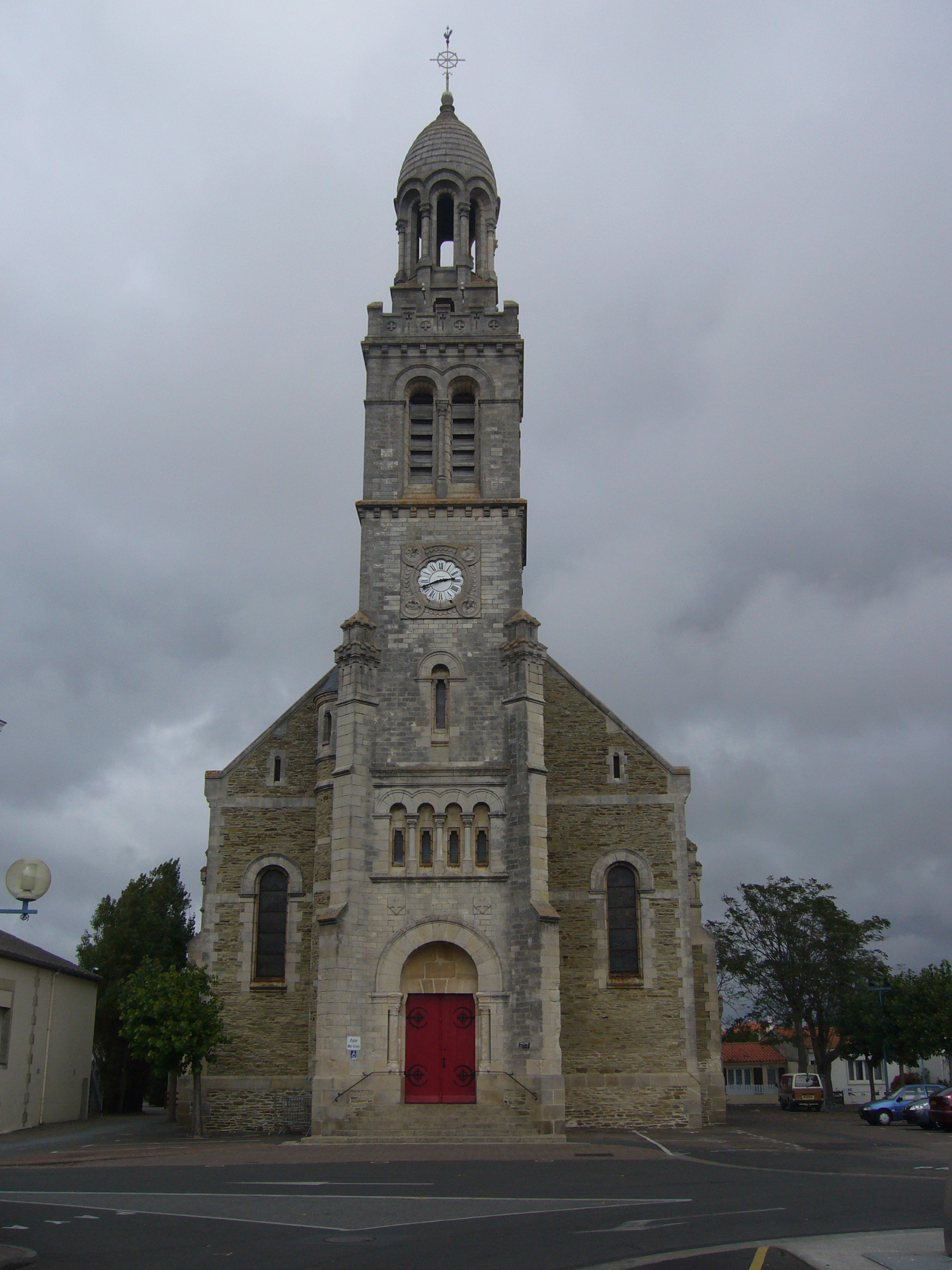 Saint-Gilles-Croix-de-Vie dans le département de la Vendée (France) : Église Saint-Croix en septembre 2007.